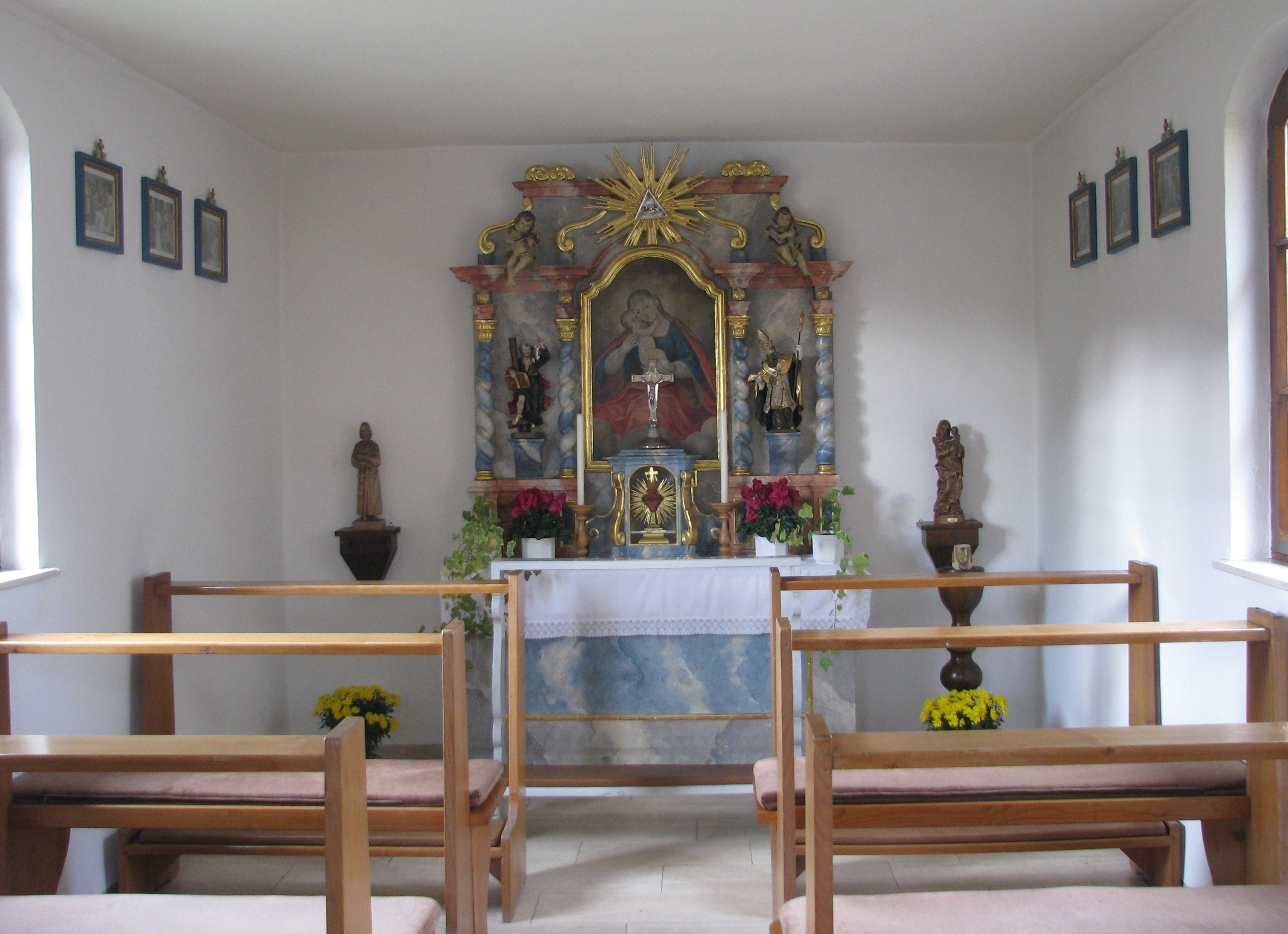 Kleinberghausen, Ortsteil der Stadt Freystadt im Landkreis Neumarkt in der Oberpfalz in Bayern, Inneres der Dorfkapelle